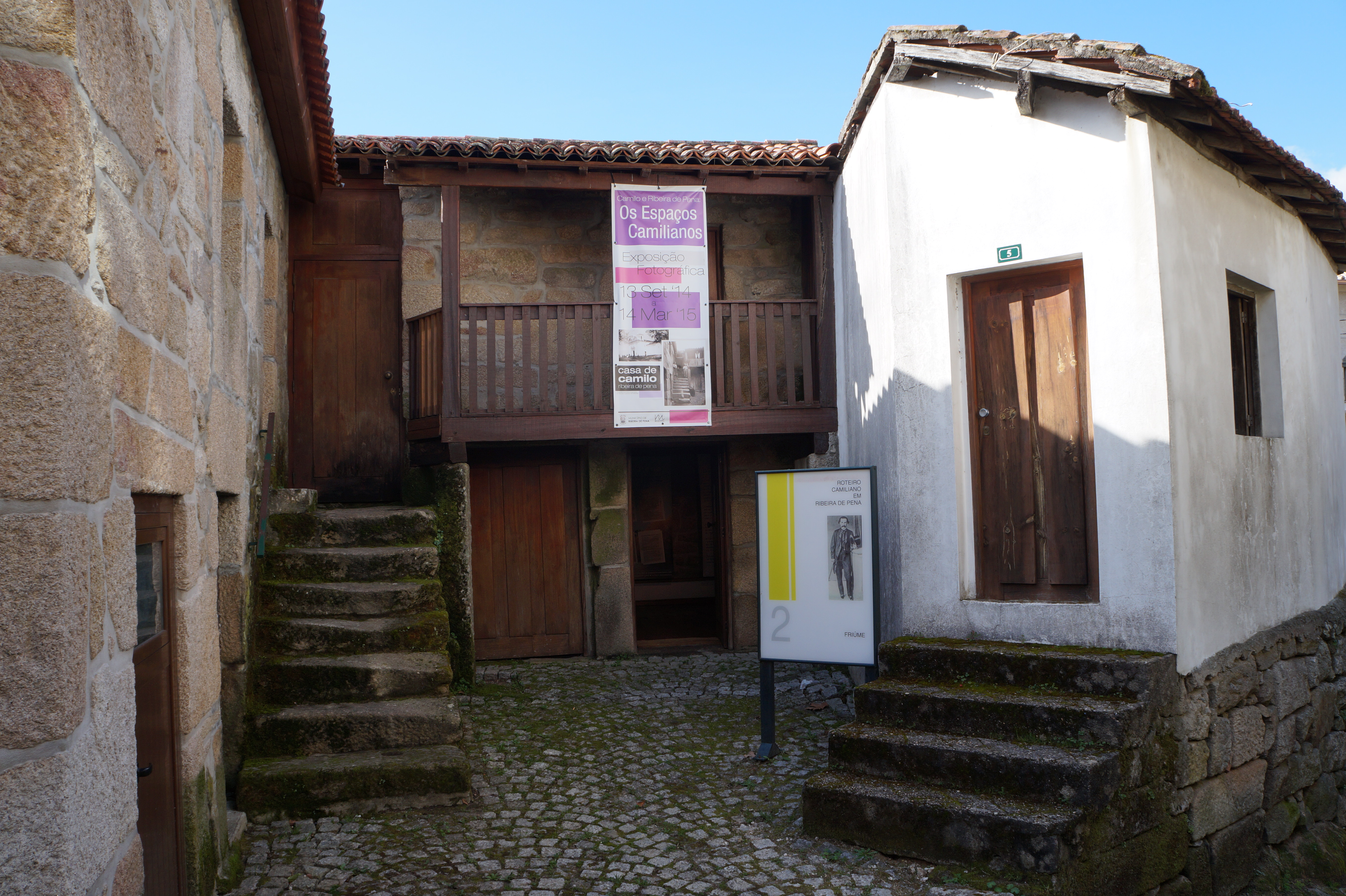 Onde viveu o escritor Camilo Castelo Branco